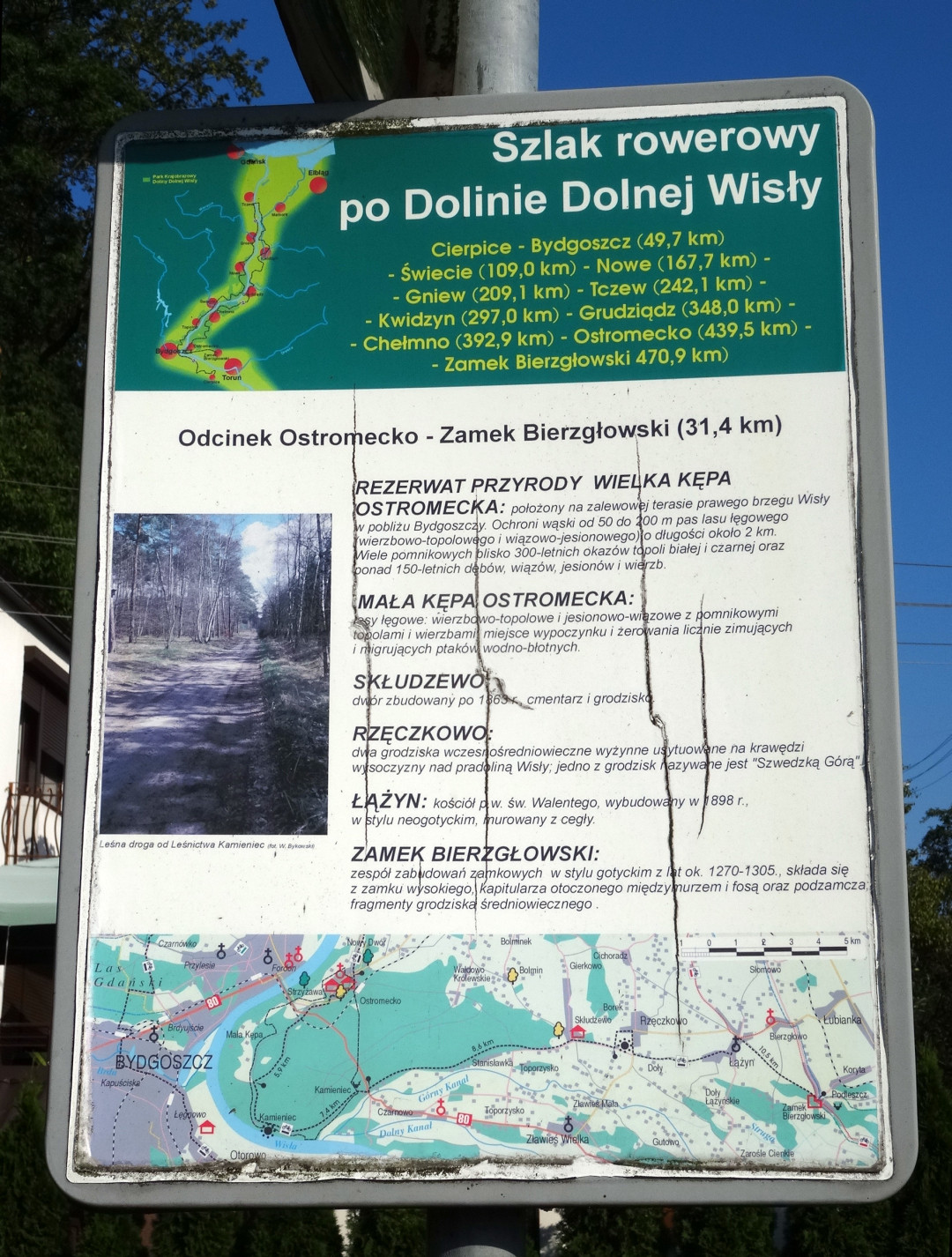 Ostromecko, gmina Dąbrowa Chełmińska